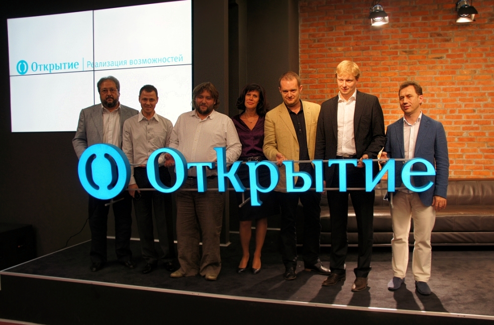 Василий Васильевич Заблоцкий (справа), председатель правления Банка Открытие (2009-2011) и другое руководство ФК "Открытие"